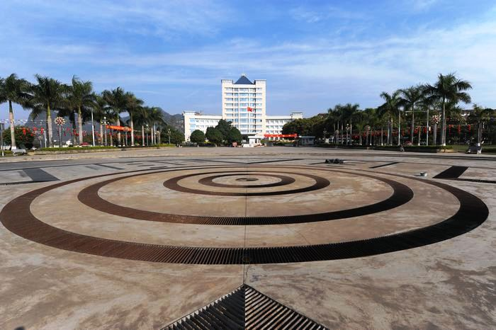 扶綏県役所